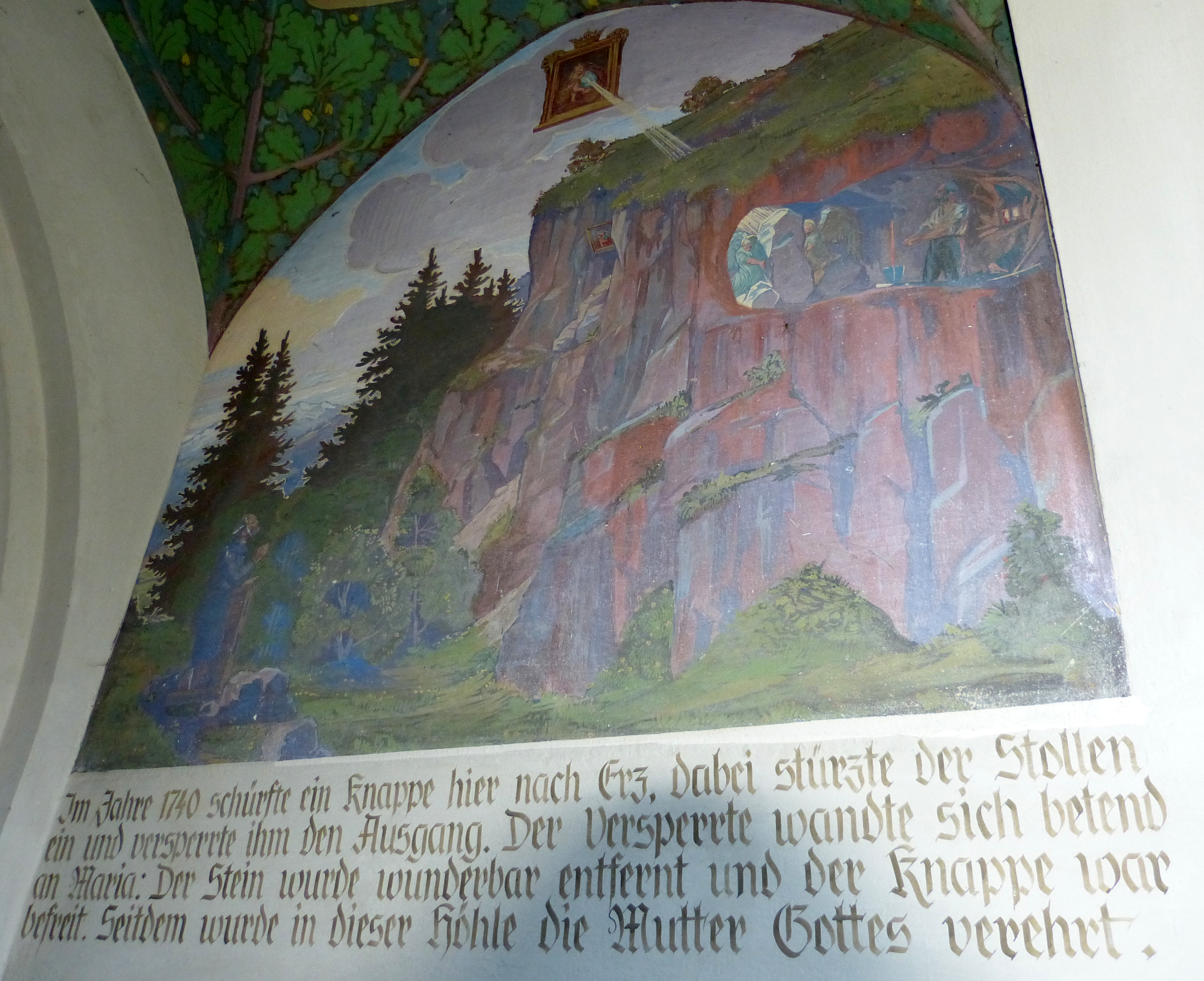 Wallfahrtskirche Maria Hilf am Locherboden, Mötz, Tirol